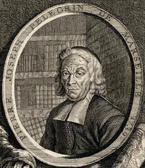 Engraving of Pellegrin